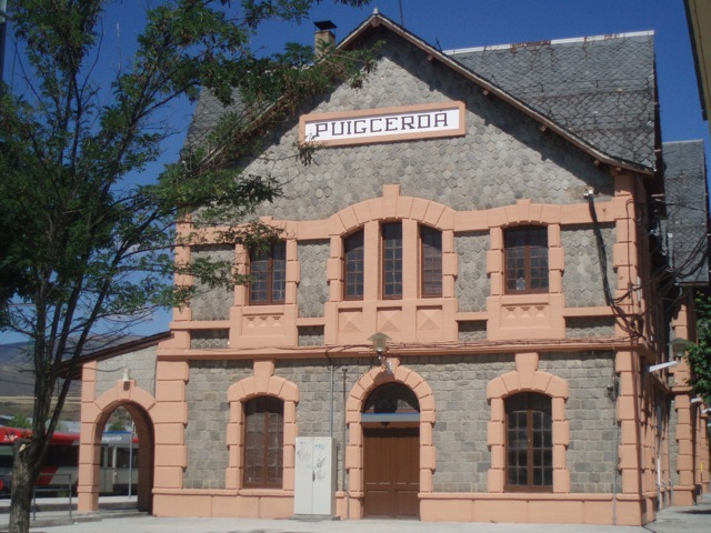 L'estació de Puigcerdà (Baixa Cerdanya, Catalunya).